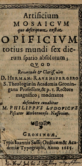 Artificium mosaicum, quo descriptam exstat opificium totius mundi sex dierum ... 1615, Hermann Ravensperger, Philipp Ludwig Piscator